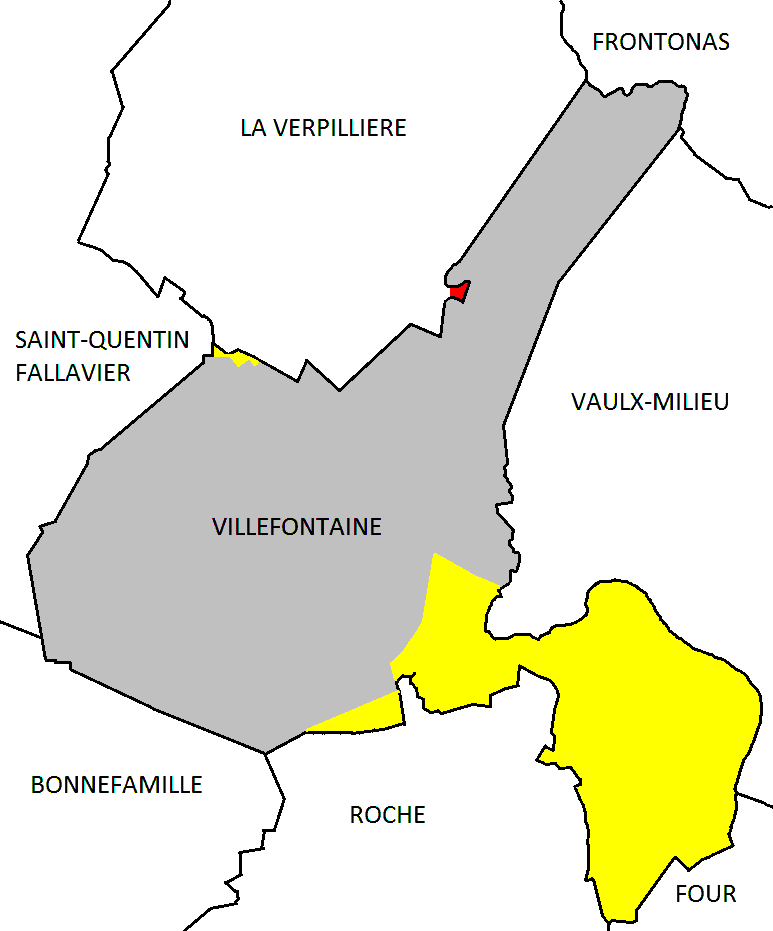 Terrains perdus et gagnés de Villefontaine sur les communes voisines de La Verpillière et Roche. En rouge, au Nord, 4 000m² sont échangés avec la commune de la Verpillière contre 15 000m² au Nord-Ouest qui créeront le quartier des Armières. Au Sud et Sud-Est, cession de terrain sur la ville de Roche. Sources: carte d'Etat-Major et carte OpenStreetMap This map may be incomplete, and may contain errors. Don't rely solely on it for navigation.